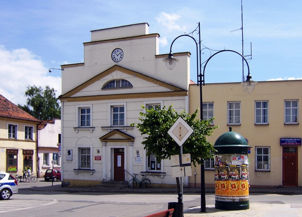 Nieszawa, ul. 3 Maja 2 - ratusz, XVIII/XIX